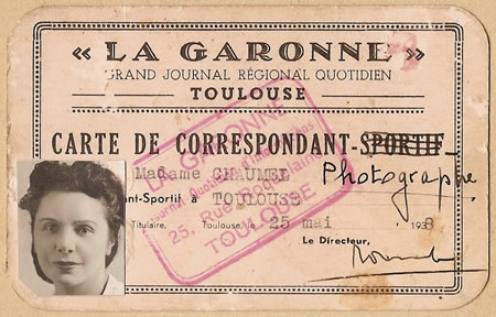 Carte de photographe du journal "La Garonne" de Germaine Chaumel.